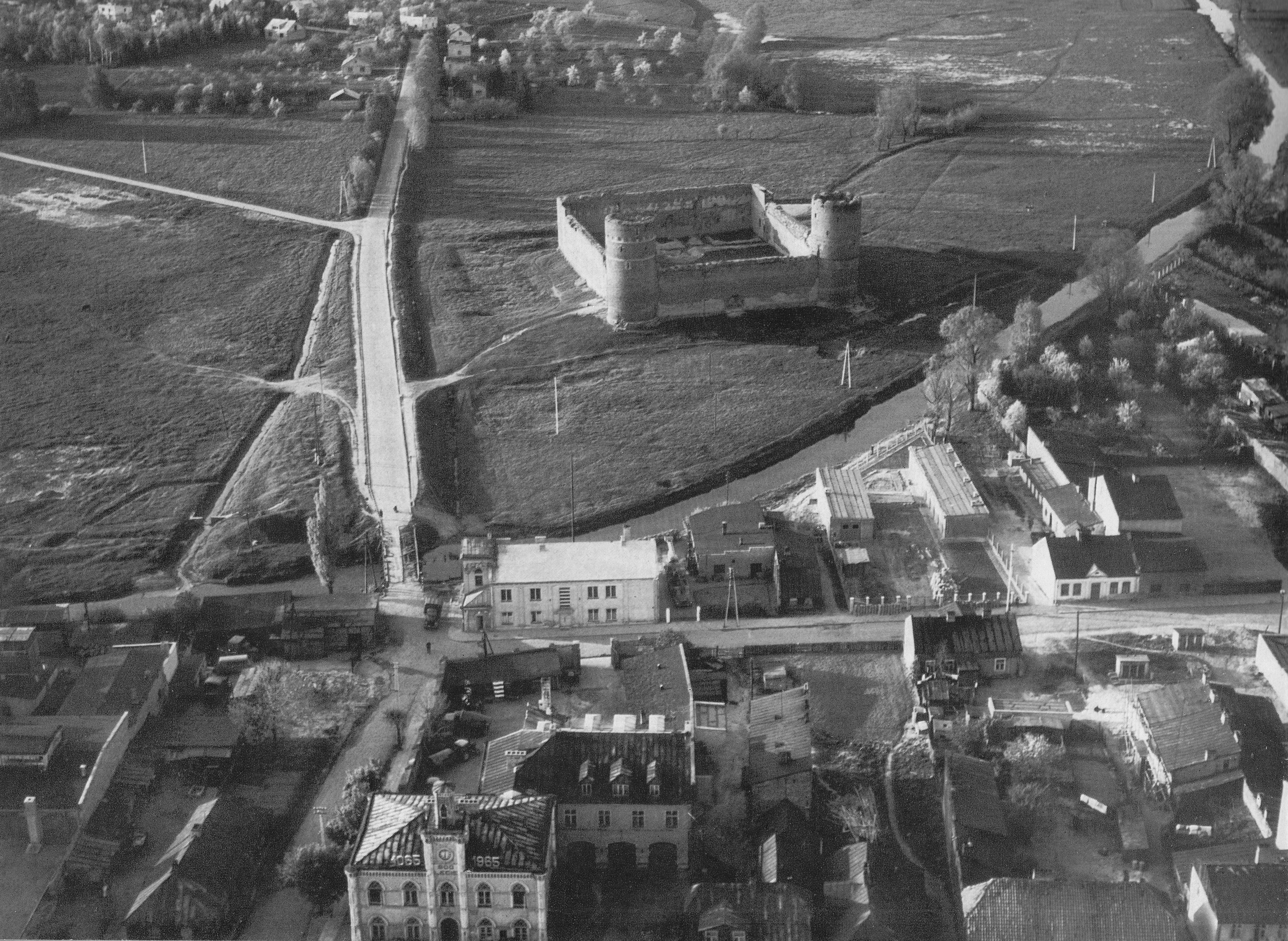 Ciechanów